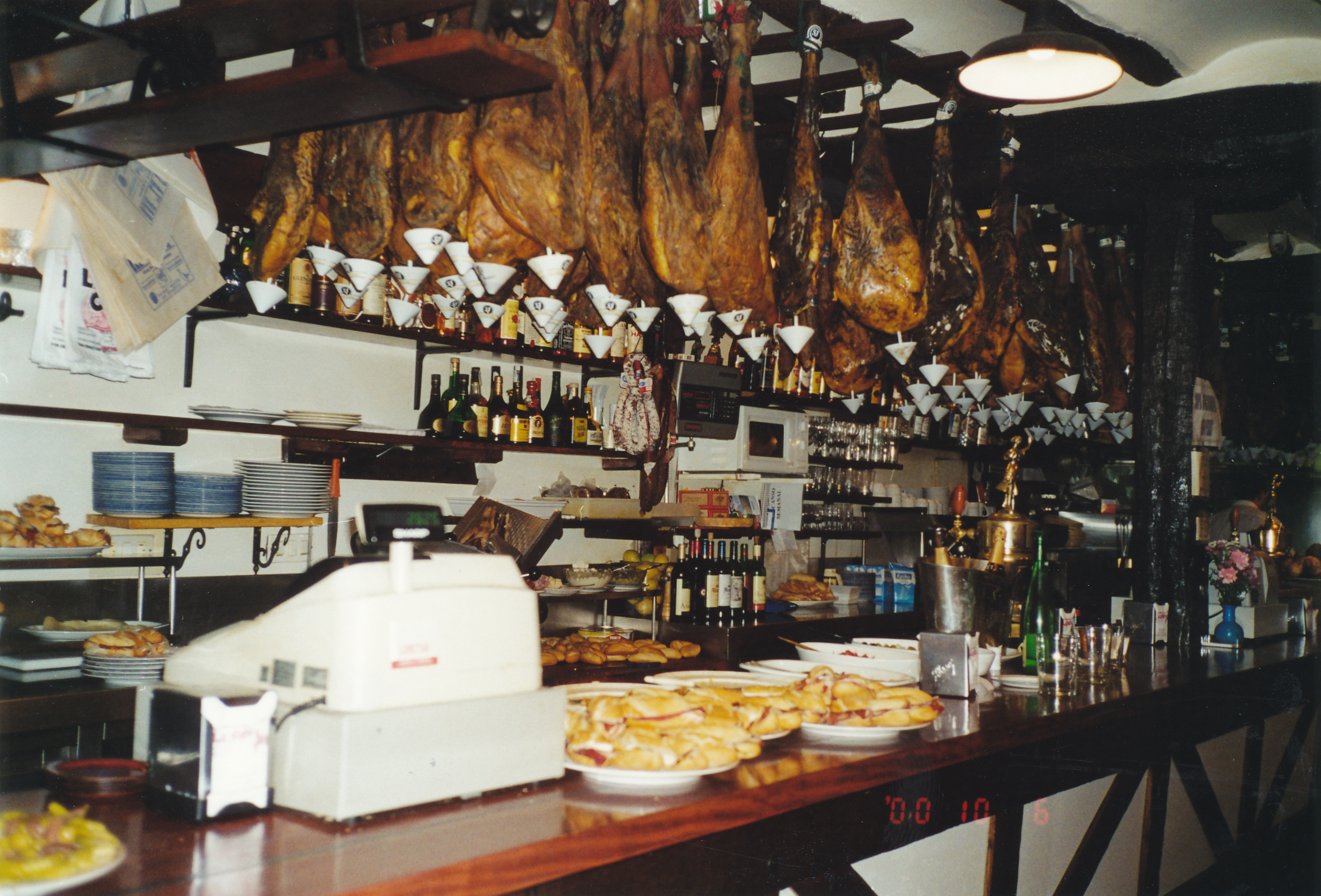 Typische Altstadtbar in San Sebastian / Donostia Datum: 06.10.2000 Urheber: Michael Pfeiffer Quelle: privates Fotoalbum des Urhebers